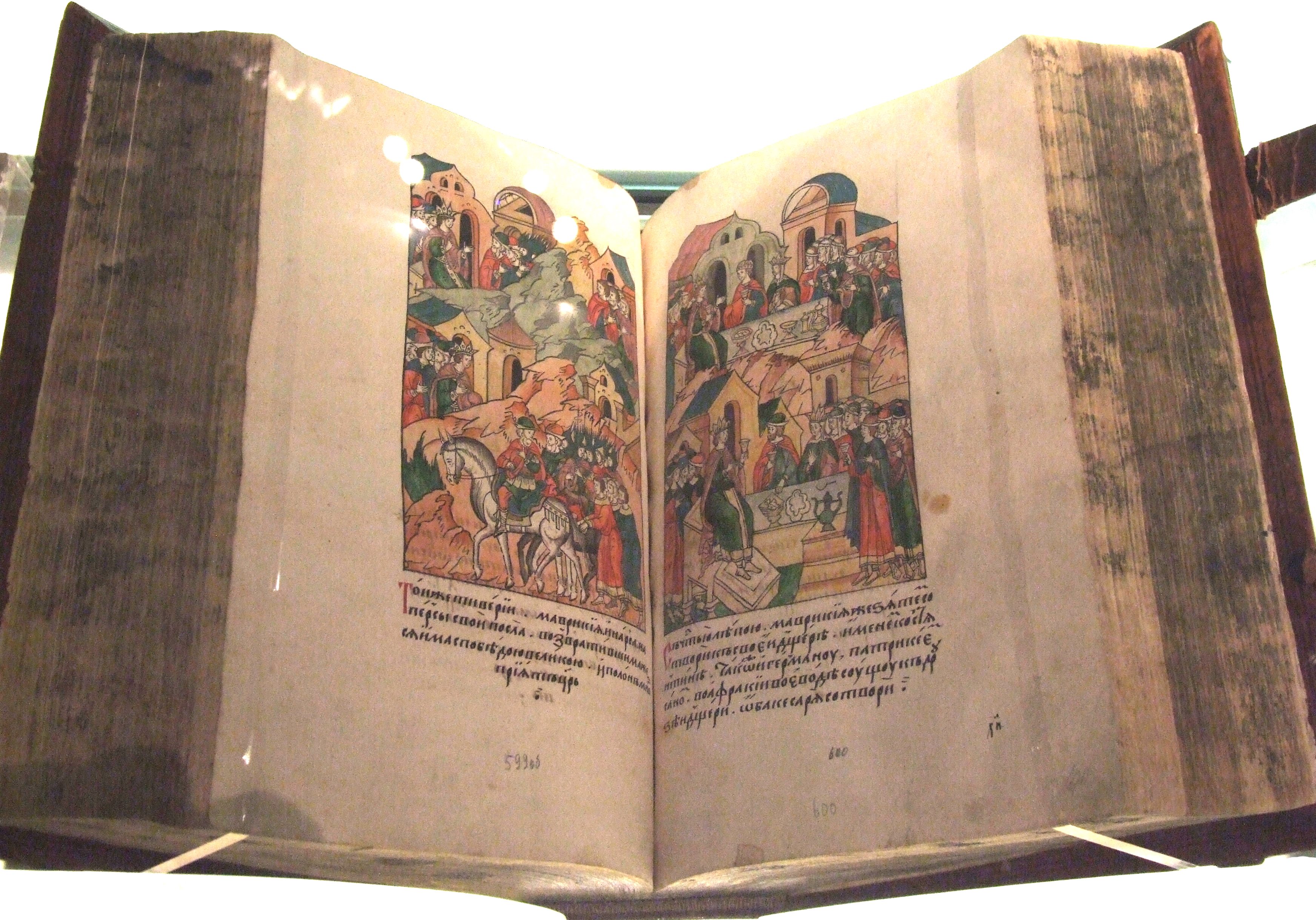 ЛИЦЕВОЙ ЛЕТОПИСНЫЙ СВОД. ХРОНОГРАФ Вторая половина XVI века Москва Бумага; чернила, киноварь, темпера; переплет – кожа 44,2 х 31,5 Поступил в 1827 году Рукопись является частью Лицевого летописного свода, созданного по заказу царя Ивана IV Васильевича Грозного во второй половине XVI века. Свод долгое время хранился в царской книгохранительнице, в 1683 году передан в Мастерскую палату и вскоре разрознен на части, каждая из которых имела свою судьбу. Сведения о Лицевом Хронографе прослеживаются в каталогах библиотеки Печатного двора (1727 и около 1775). В 1786 году этот том фигурирует в описи книг Типографской библиотеки, предназначенных для передачи в Синодальную библиотеку. В начале XIX века том принадлежал греческому дворянину Зою Павловичу Зосиме, крупному коммерсанту и благотворителю РНБ инв. ОСРК. F. IV.151